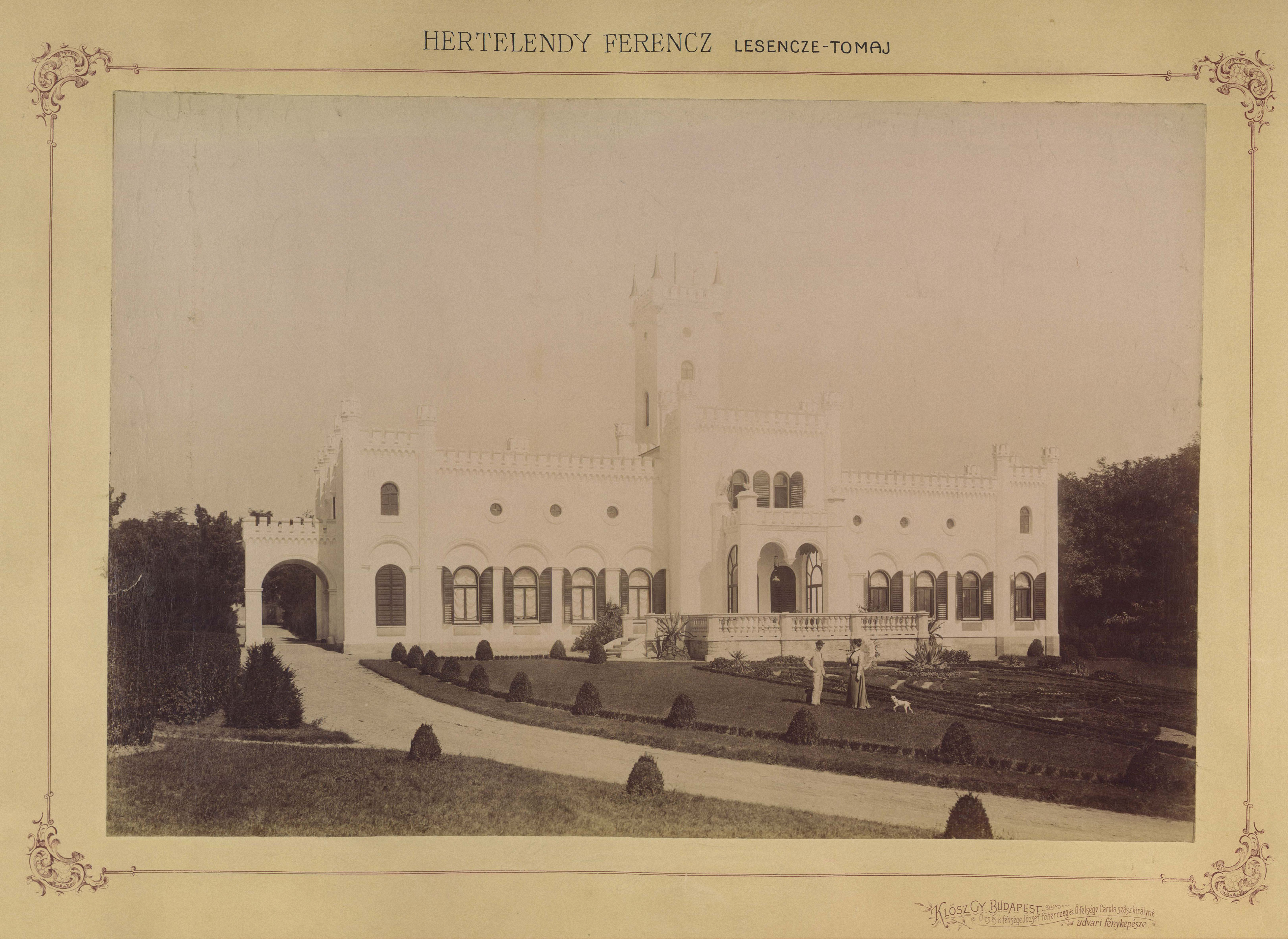 Hertelendy-kastély. A felvétel 1895-1899 között készült. A kép forrását kérjük így adja meg: Fortepan / Budapest Főváros Levéltára. Location: Hungary